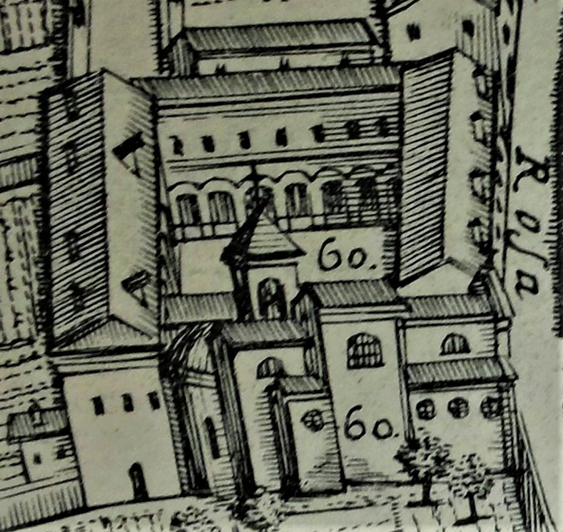 La chiesa di Santa Maria del Tempio che fu detta anticamente anche "del Guazzaturo" (perché nelle vicinanze c'era il Canal Panfilio ove si soleva portare i cavalli a bere) e "della Rosa" (dal termine per "roggia", roxa) e appartenne all'ordine templare.